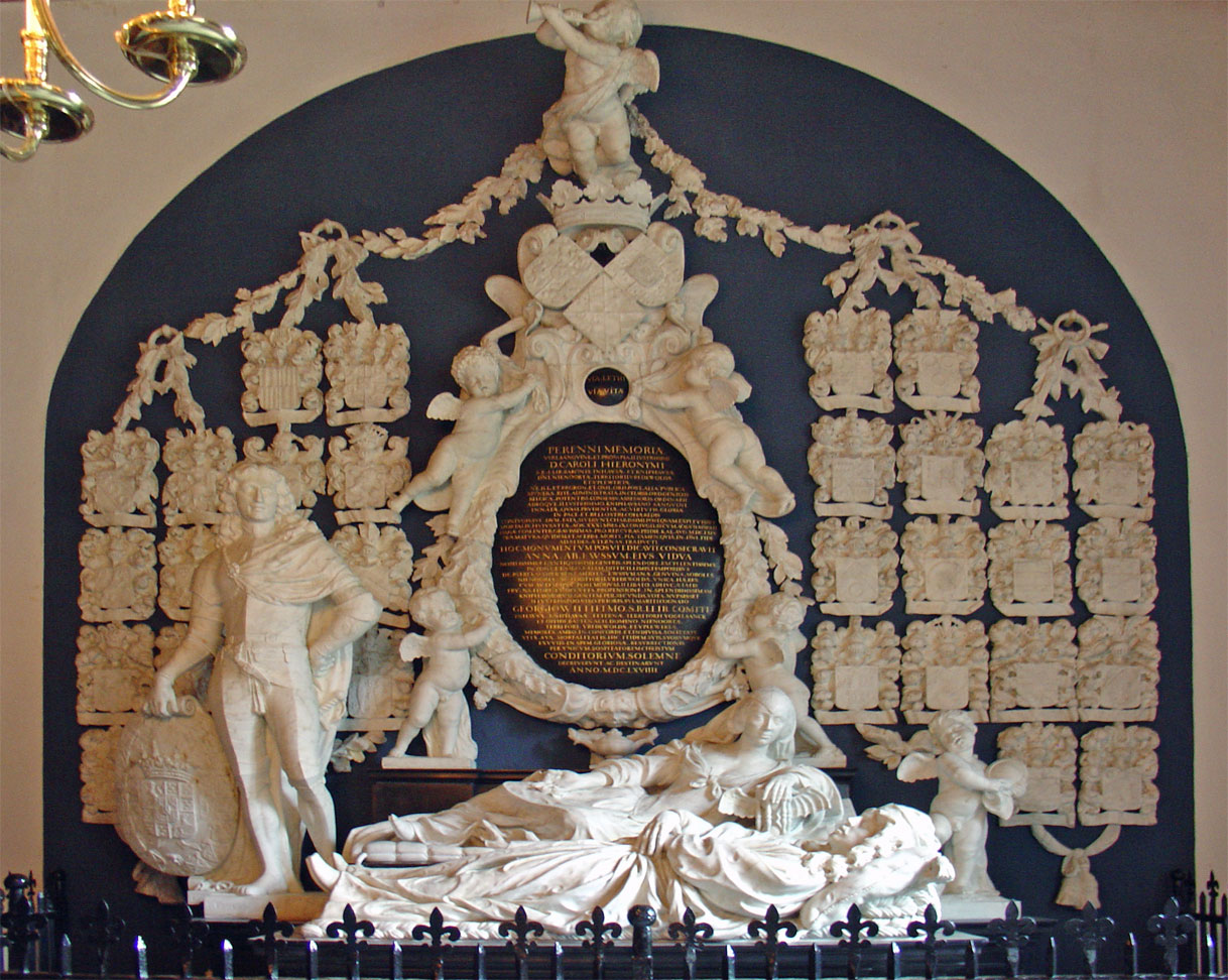 Praalgraf in de kerk van Midwolde door Rombout Verhulst en Bartholomeus Eggers